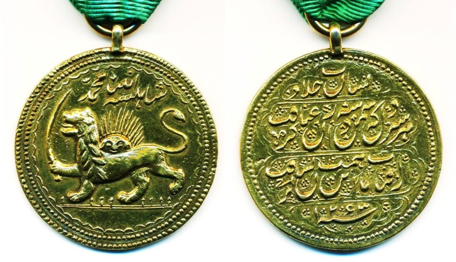 نشان جلادت محمد شاه قاجار با تصویری متفاوت از شیر